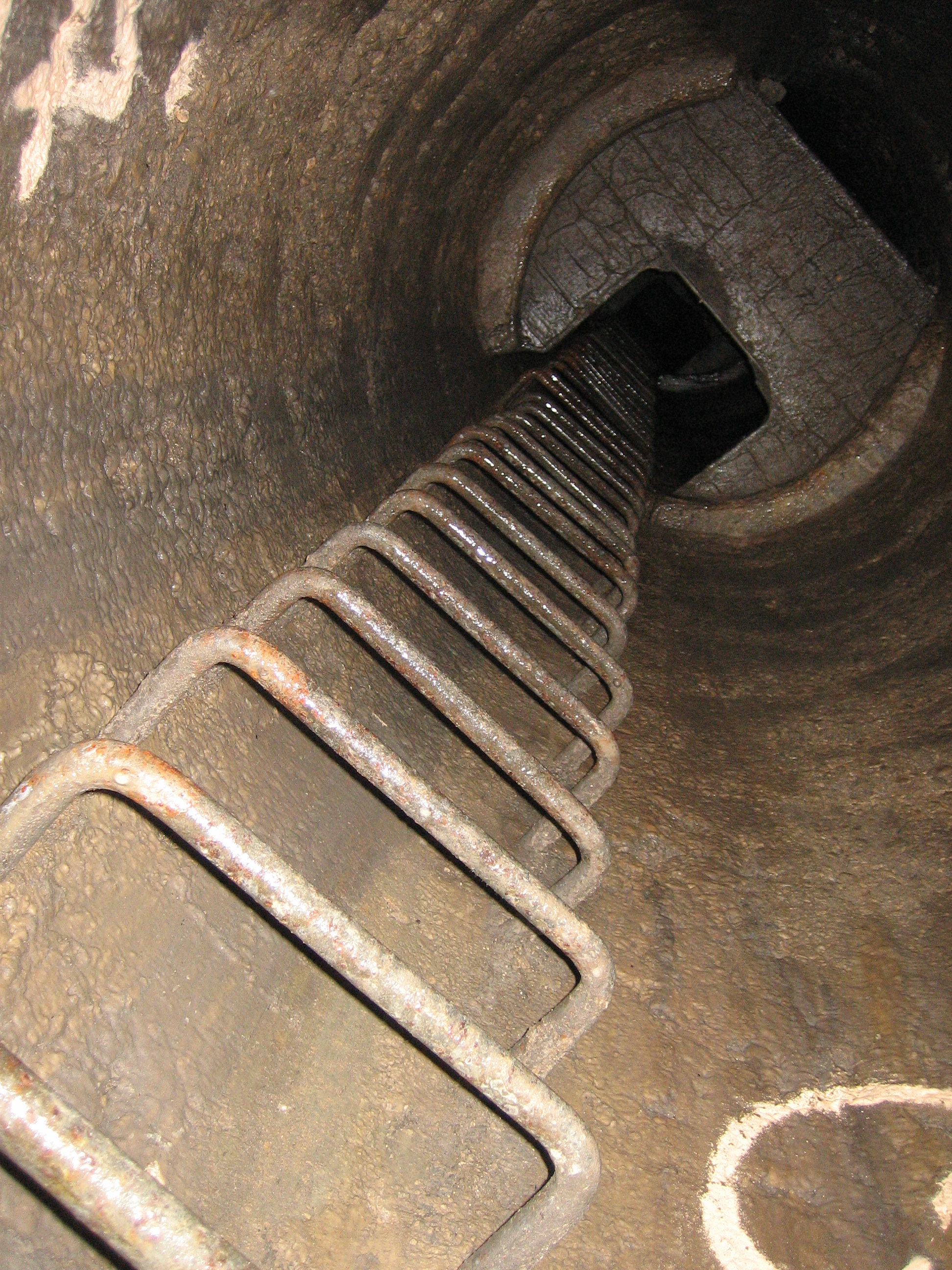 Promenade dans les catacombes de Paris, près du Charlety